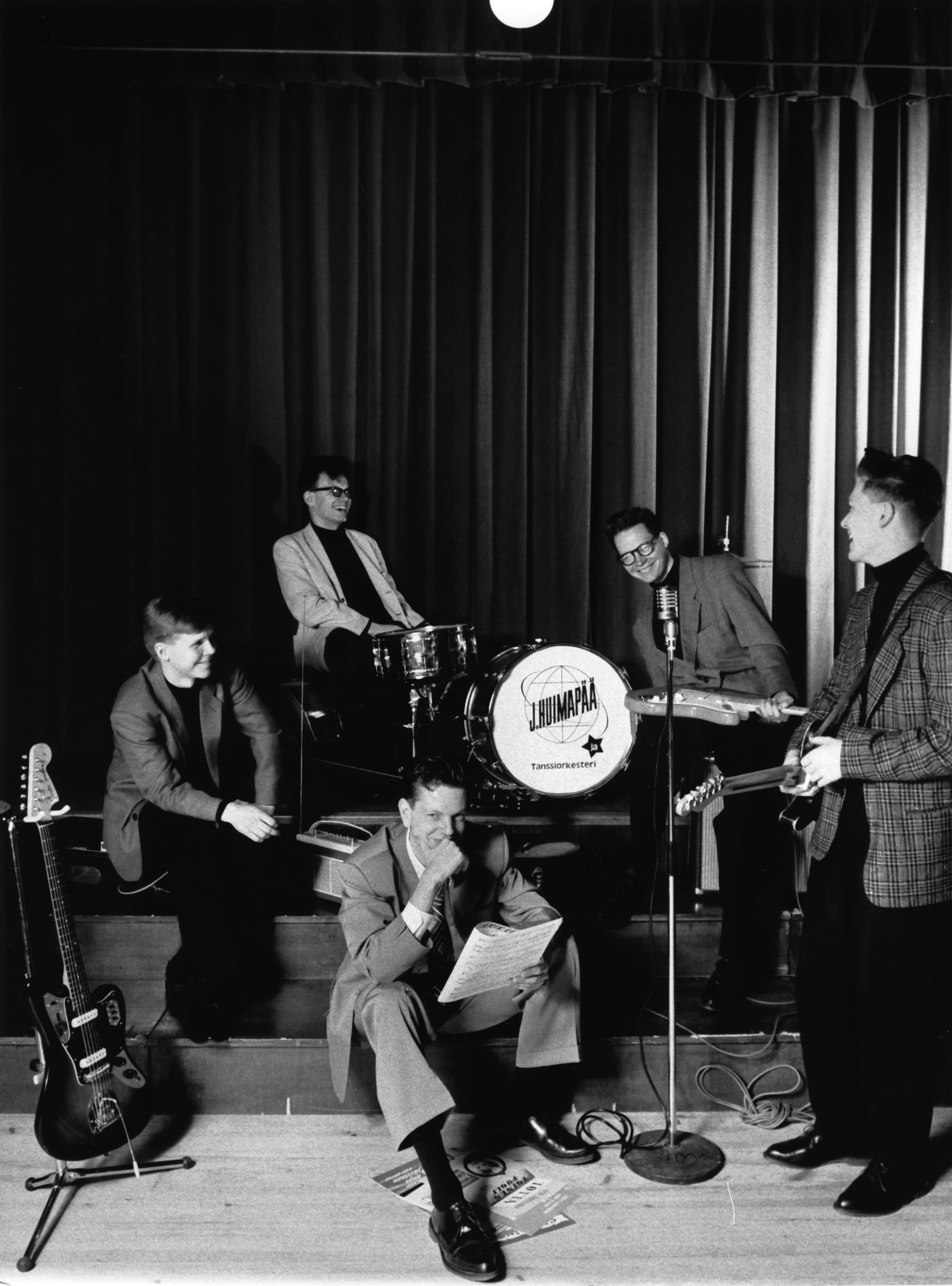 J. Huimapää ja Tanssiorkesteri, nuorisoseurantalo Berghyddan.